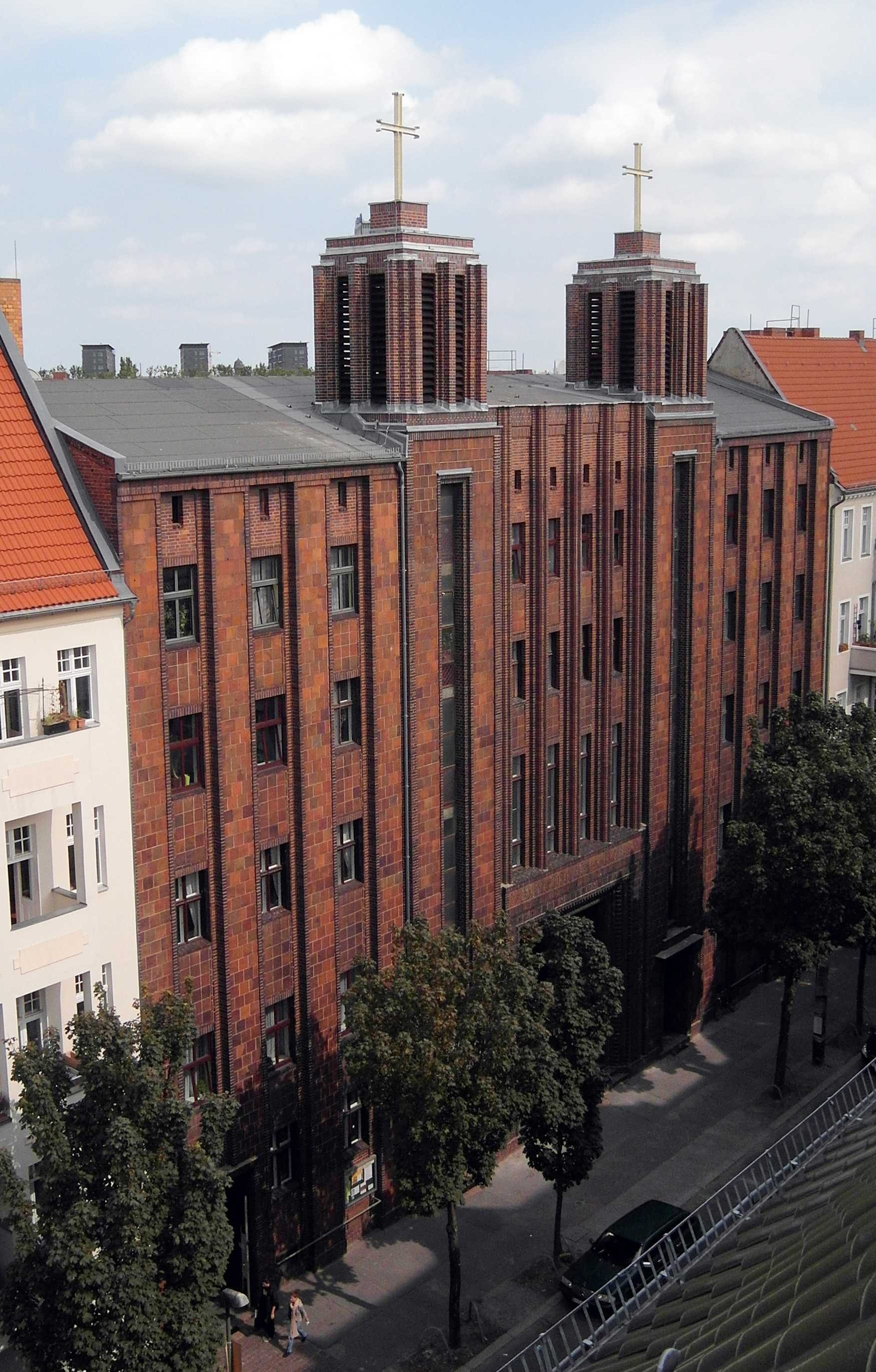 Frontansicht der Bekenntniskirche in Berlin-Alt-Treptow